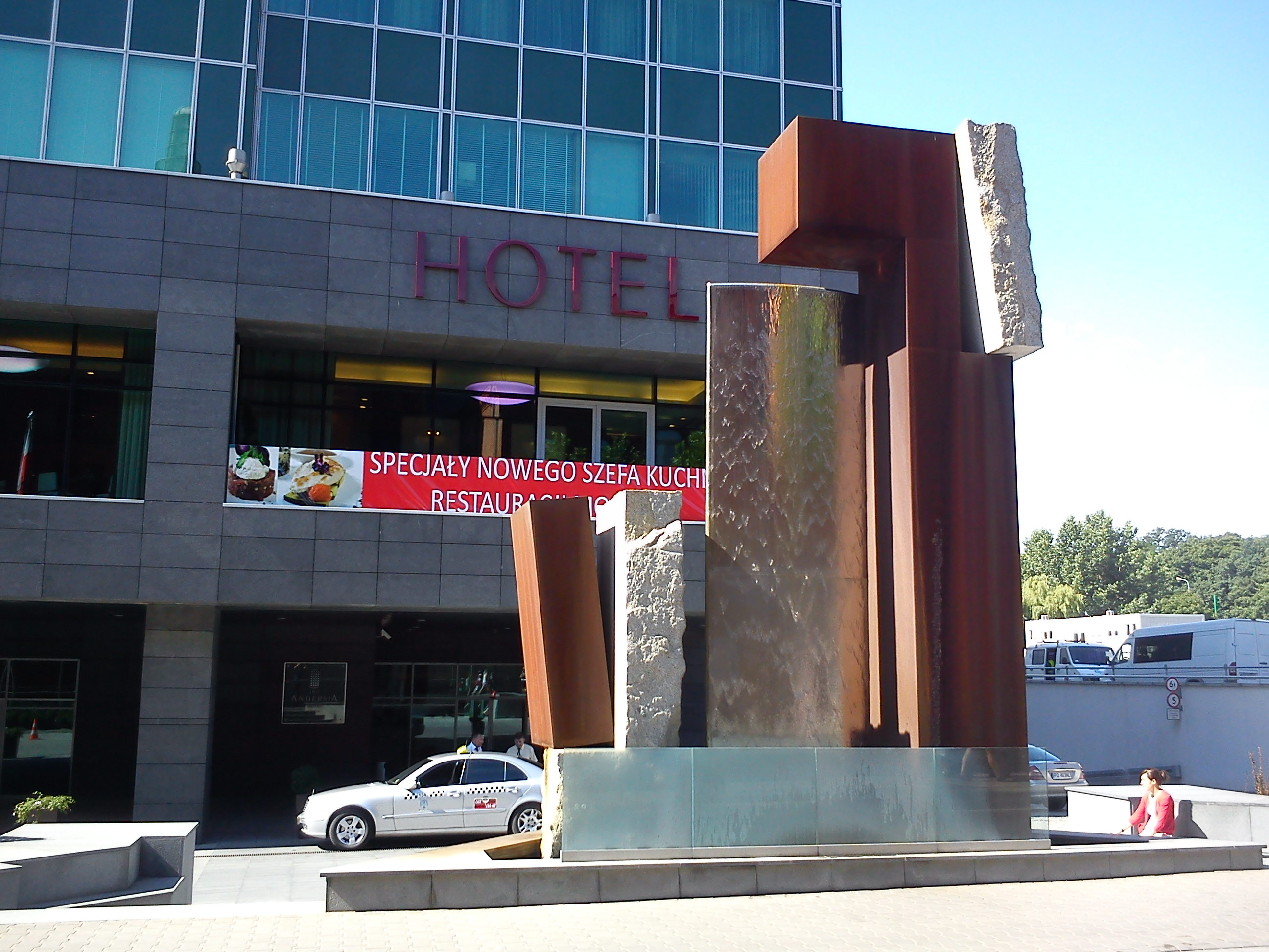 Fonatanna przy Andersii, Poznań.